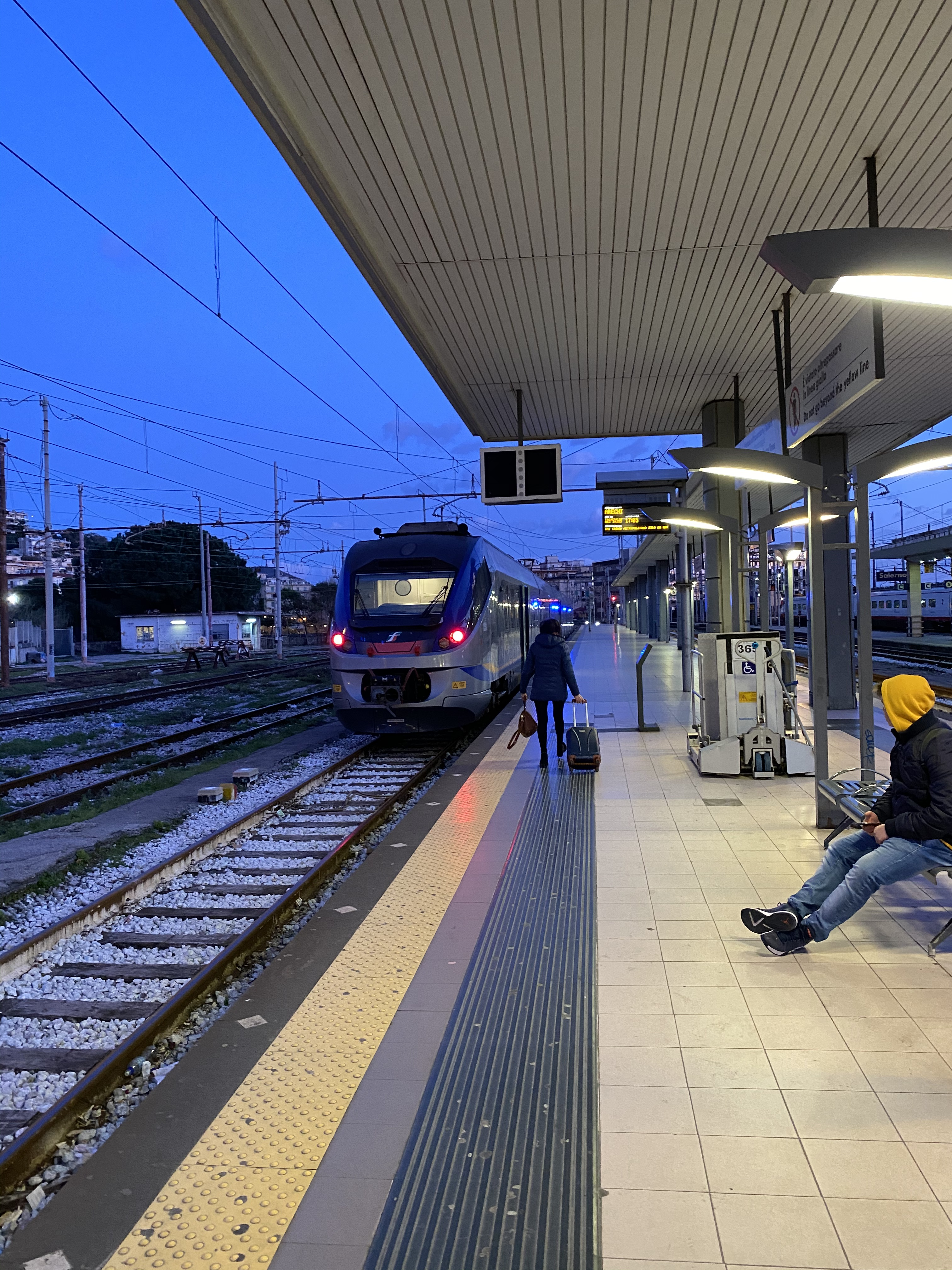 Salerno metropolitan railway service